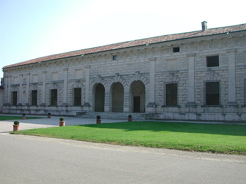 Palazzo Te di Mantova Source: photo uploaded by User:RicciSpeziari. Photographer: Riccardo Speziari